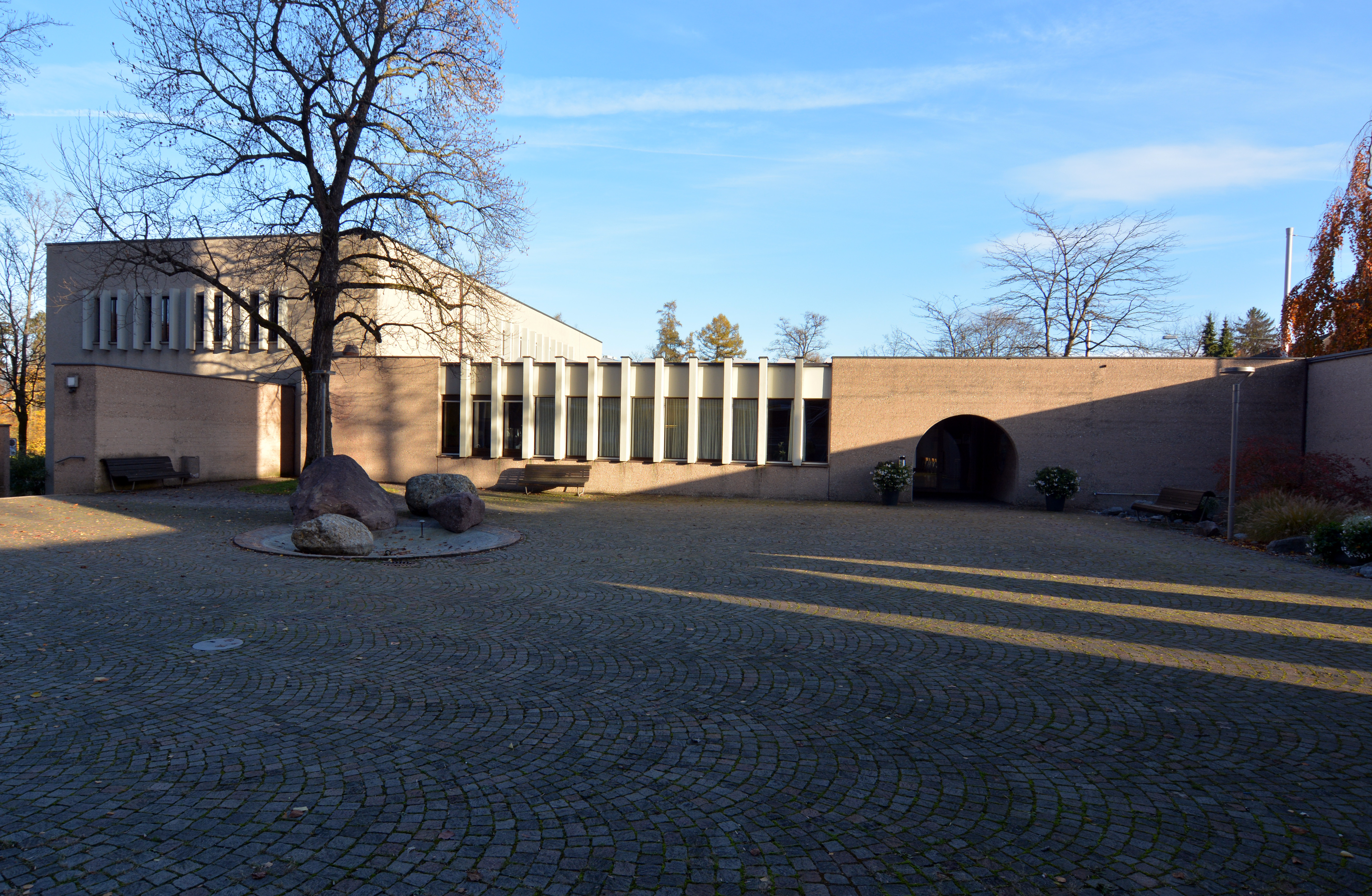 Kirchliches Zentrum Glaubten, Zürich-Affoltern, 1965–72. Blick über den Kirchenplatz auf das Gemeinschaftszentrum. Architekten: Rudolf und Esther Guyer